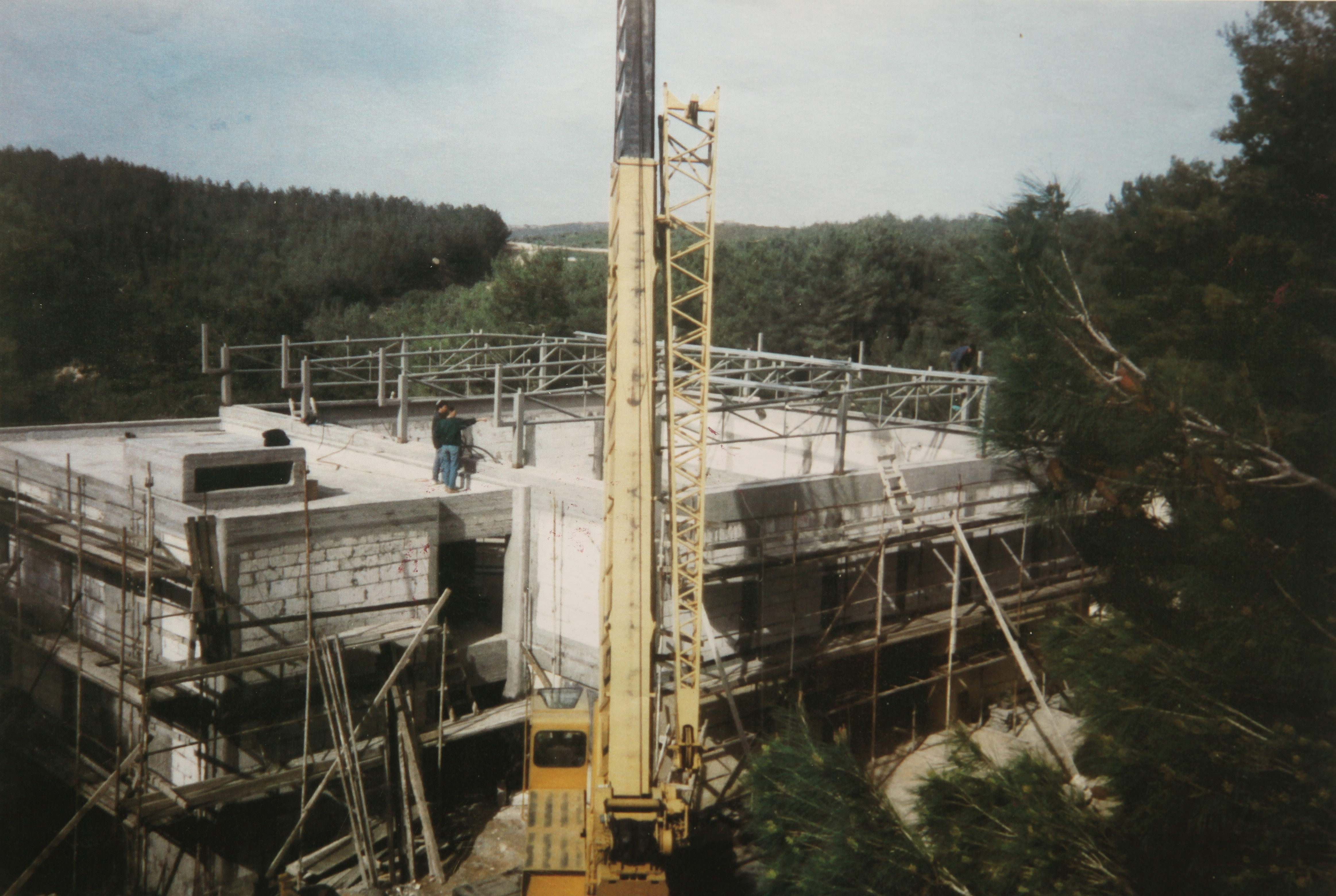 הקמת המוזיאון